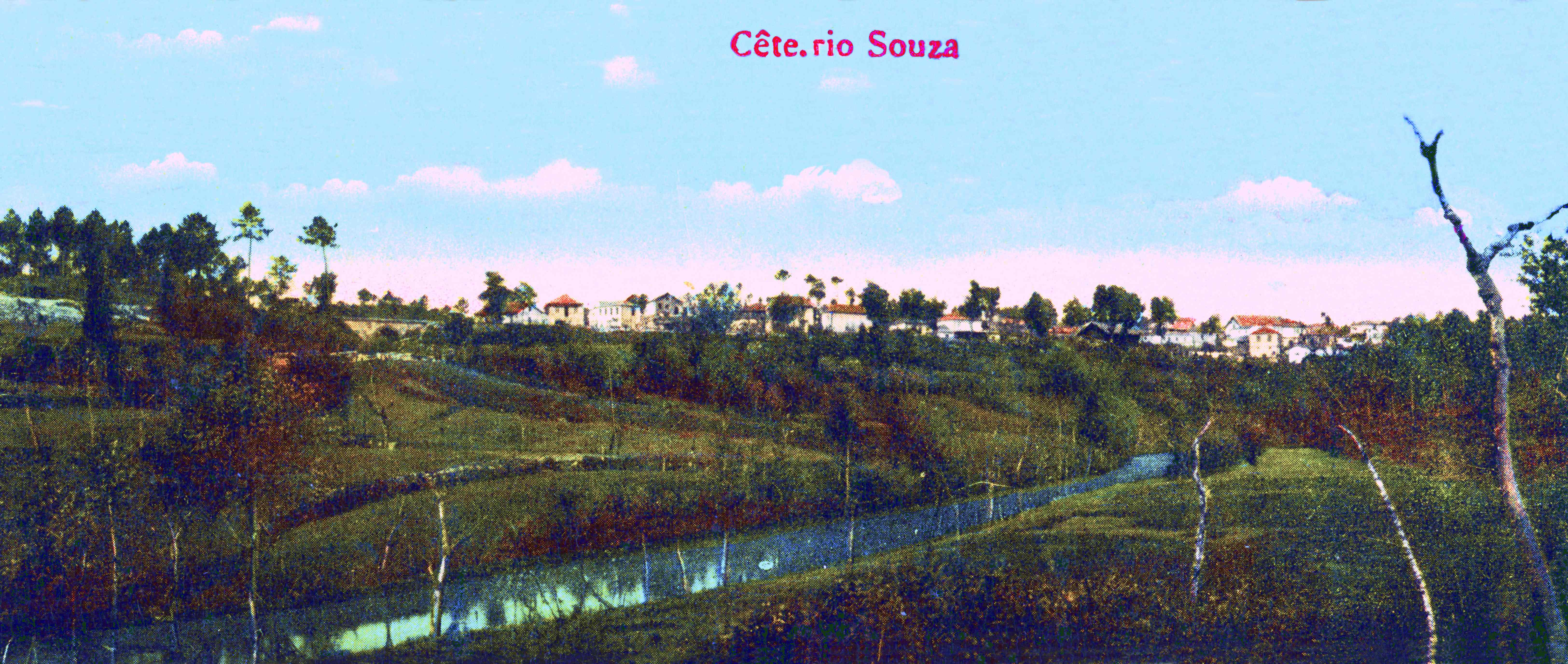 Vue de la rivière Sousa à hauteur de la gare de cete, Paredes, portugal